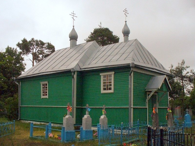 Ляхаўцы. Капліца